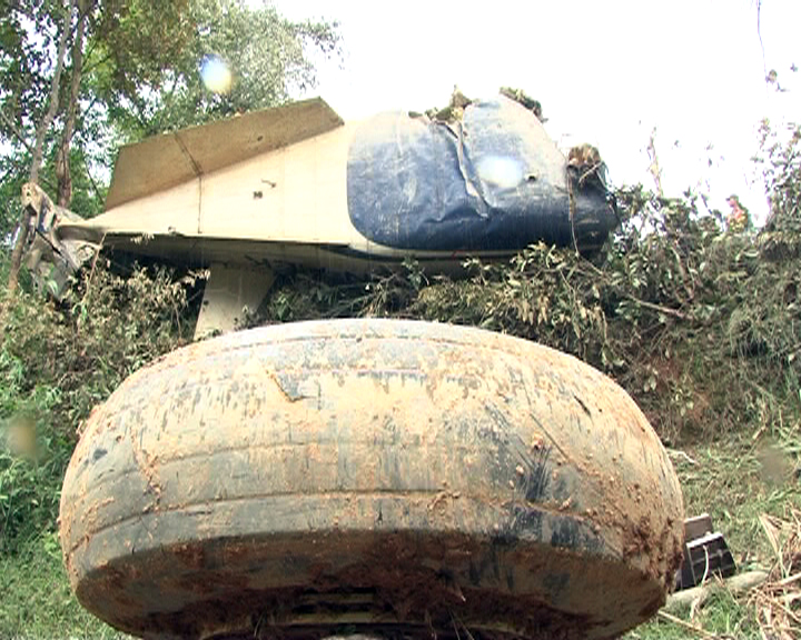 नेपाली: बुद्ध एअर दुर्घटना